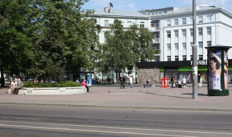 Kompassi plats, Tallinn.